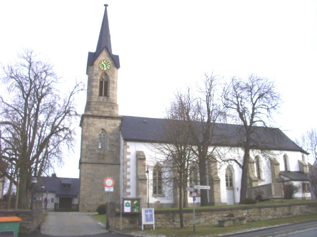 Kirche St. Veit - Markt Sparneck (Landkreis Hof, Oberfranken)